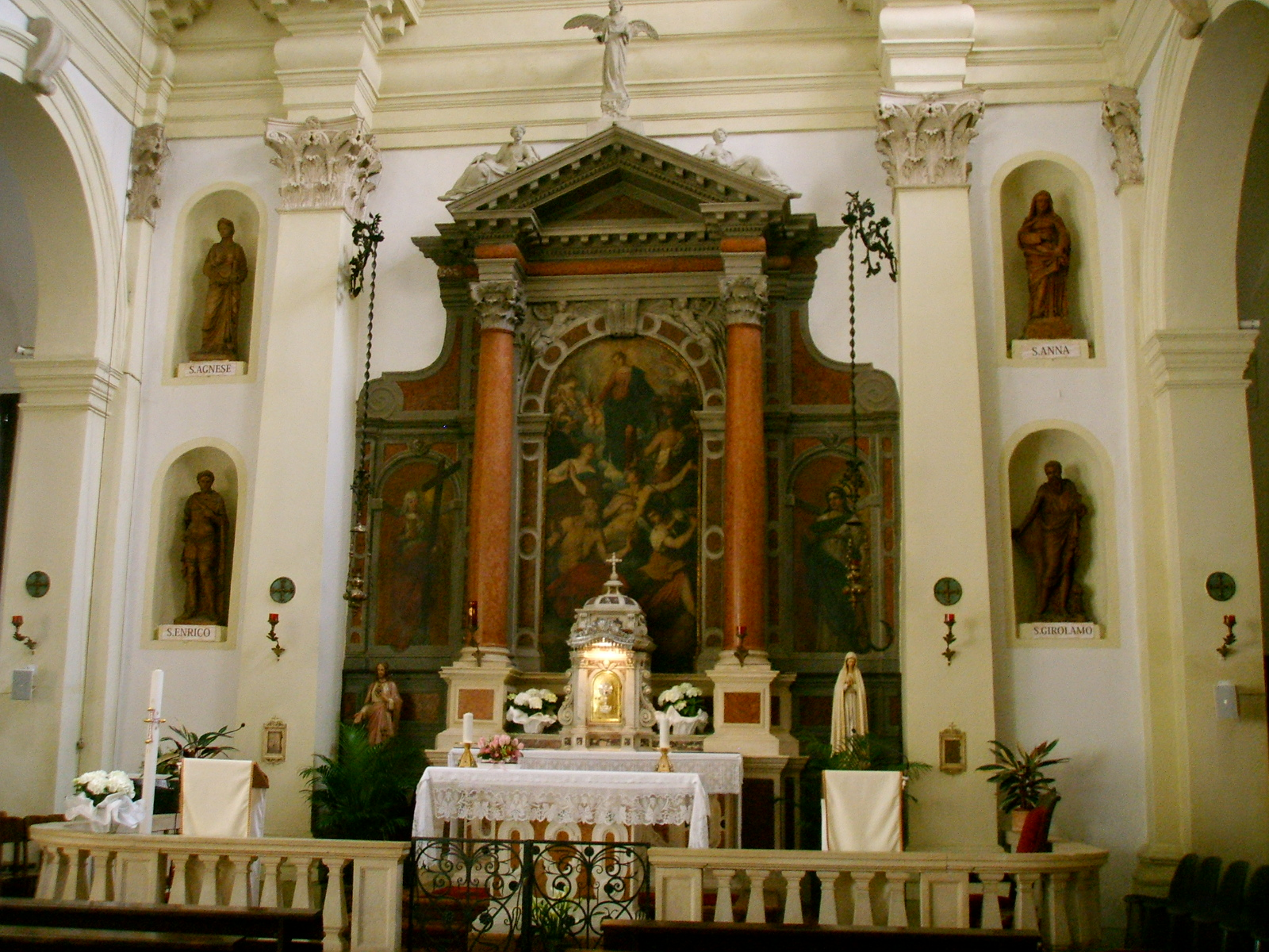 Padova, chiesa di san canziano